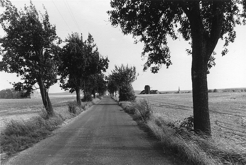 Original image description from the Deutsche Fotothek Wermsdorf-Luppa. Blick zur Bockmühle